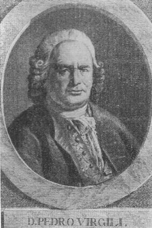 Retrato de Pedro Virgili de la Biblioteca Nacional de España (BNE)